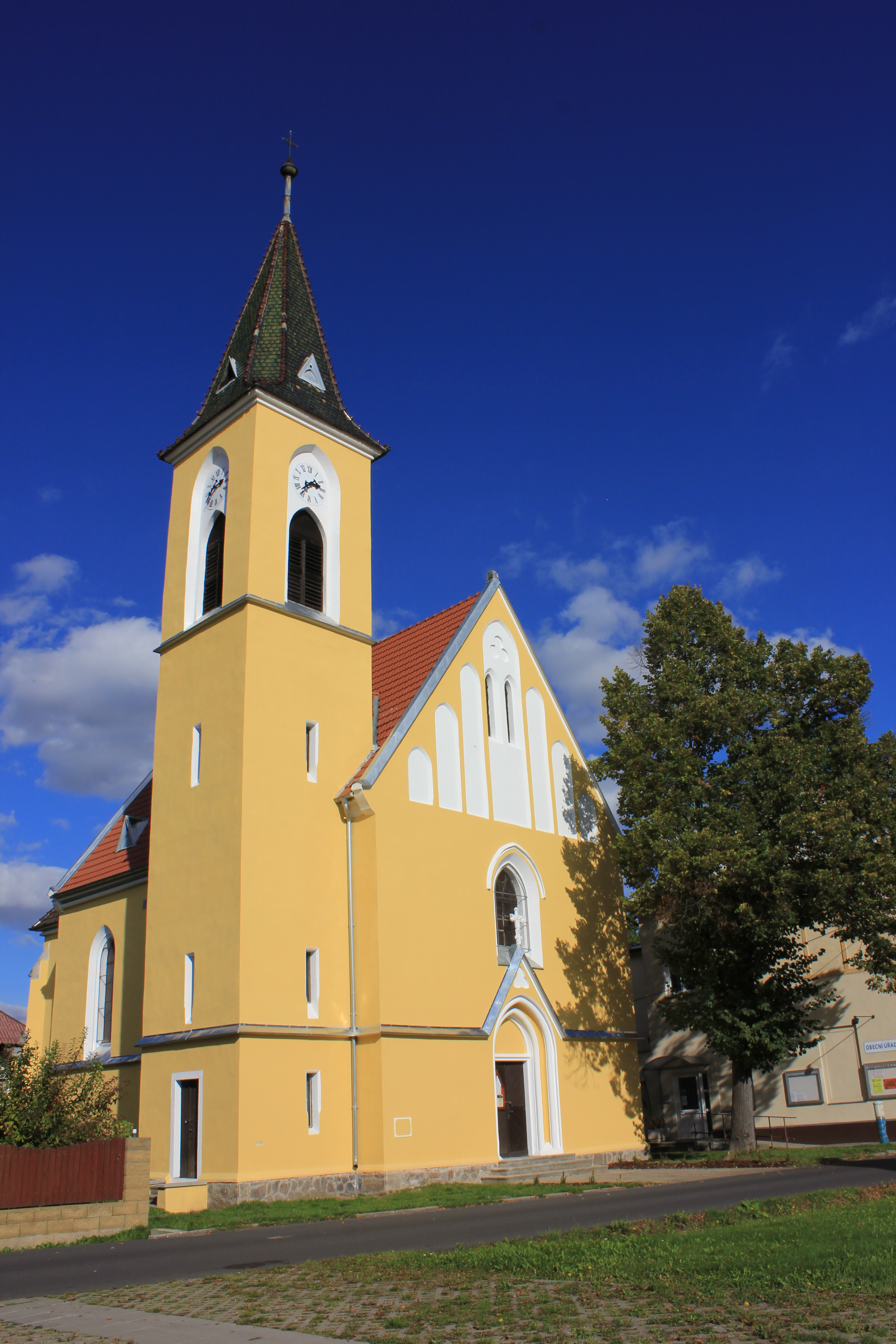 Jihozápadní pohled na sv. Barboru v Otvicích